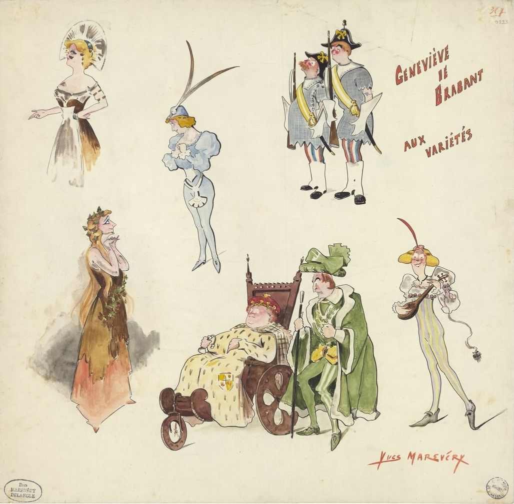 Geneviève de Brabant (opéra bouffe) de Hector Crémieux et Étienne Tréfeu aux Théâtre des Variétés, dessin de Yves Marevéry : Geneviève Vix, Jeanne Saulier, Moricey, Albert Brasseur, Germaine Gallois, Georges Guillaume Guy, Max Dearly, Charles Prince